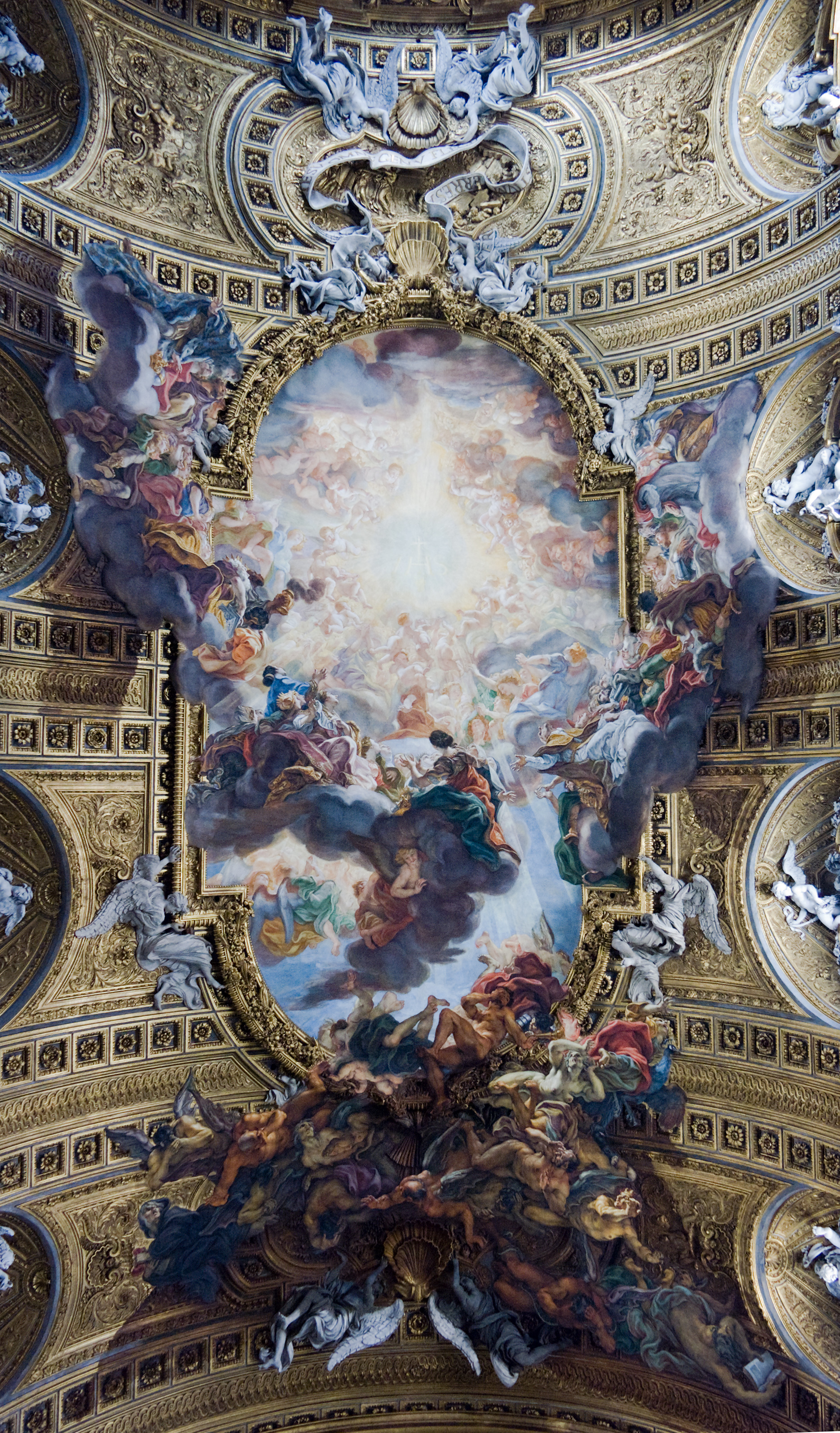 Rome, Église du Gesù, Fresque